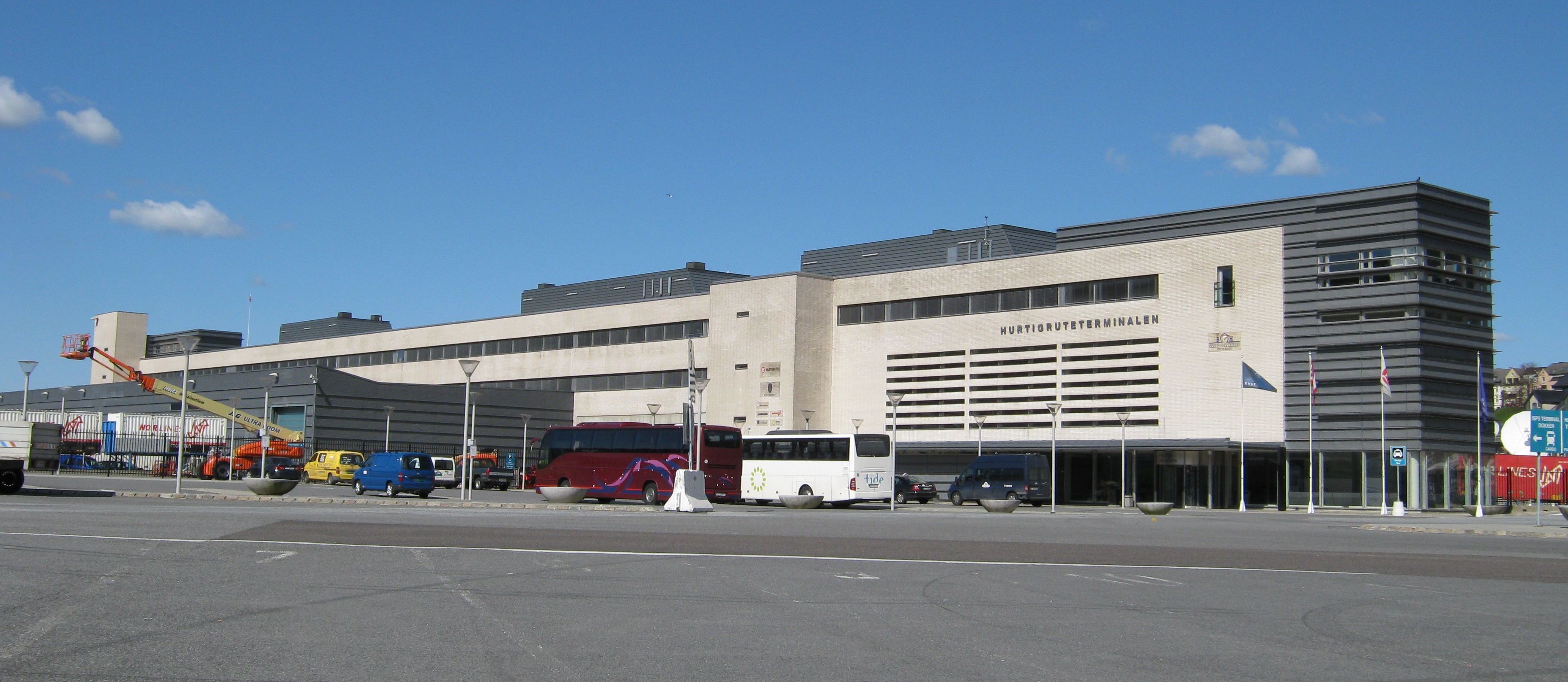 Hurtigruteterminalen i Bergen.